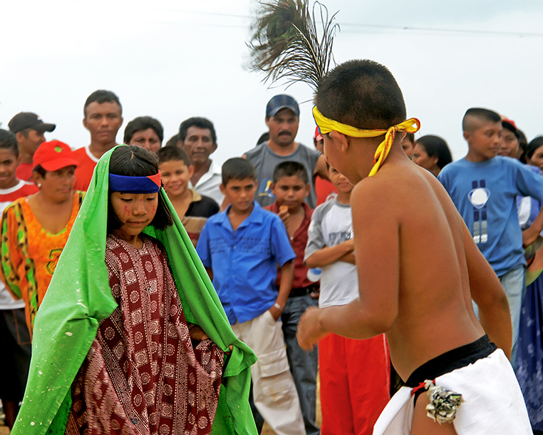 Es una danza propia del indígena Wayúu o Guajira que se celebra como forma de entretenimiento y a pesar de todo tiene su significado aunque solo parezca un juego donde el ritmo del tambor la mujer trata de derribar al hombre, esta danza demuestra un equilibrio social entre hombre mujer y según se dice hasta la relación con el cosmos.